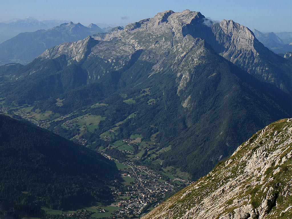 Thônes depuis le Mont Lachat 2.023 m. Vue sur le Massif de la Tournette 2.351 m